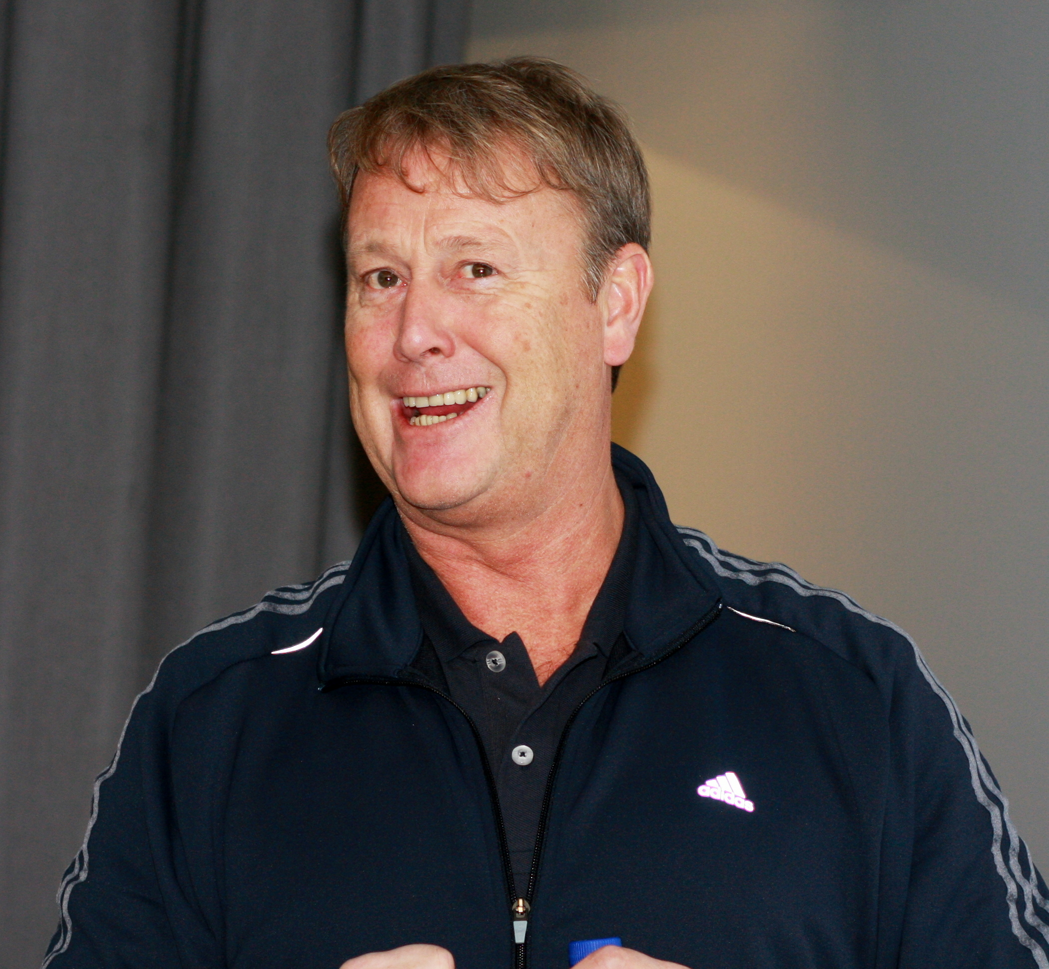 Åge Hareide